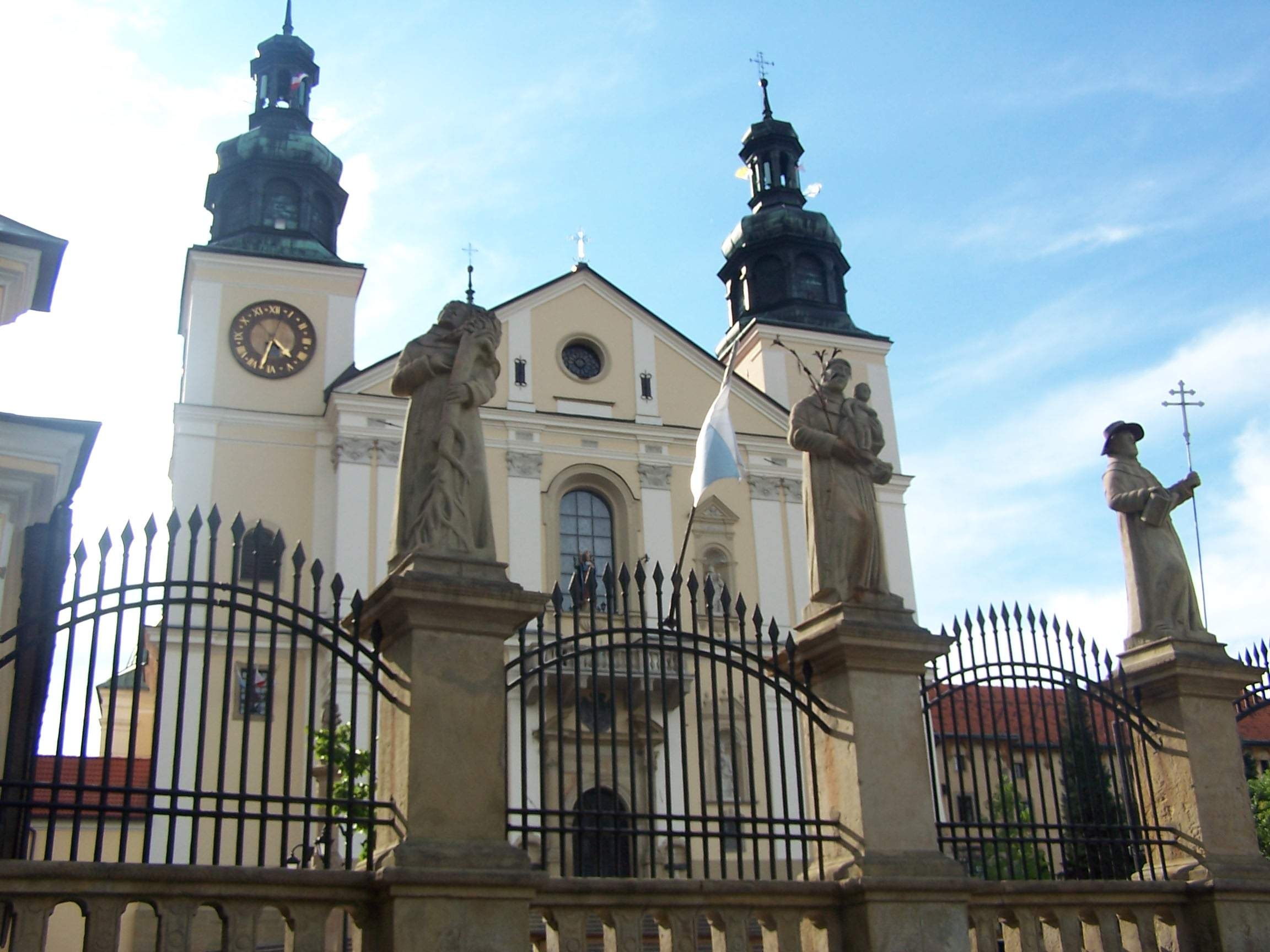 Photo by Piotrus. Monastery in Kalwaria Zebrzydowska.